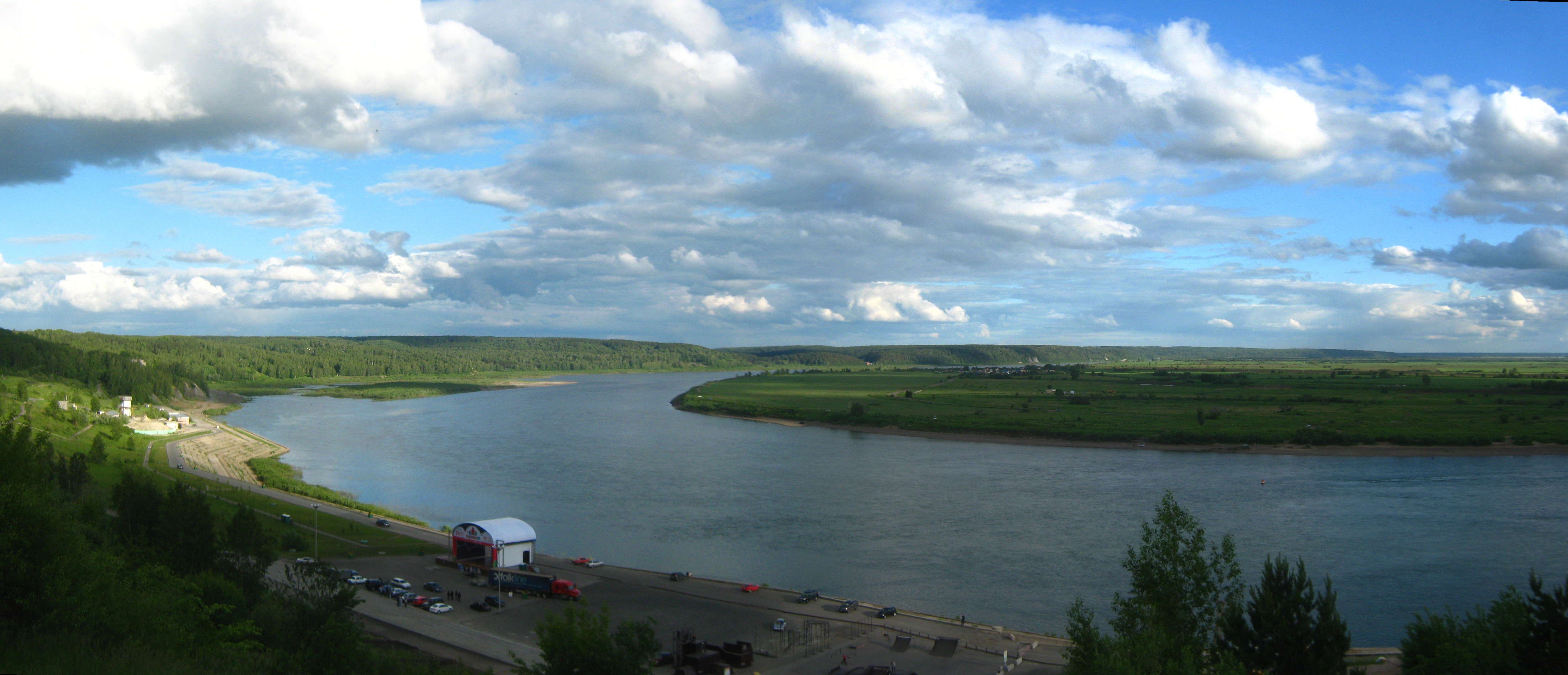 Лагерный сад